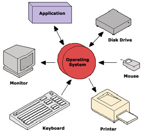 Монгол: хуваарилалт